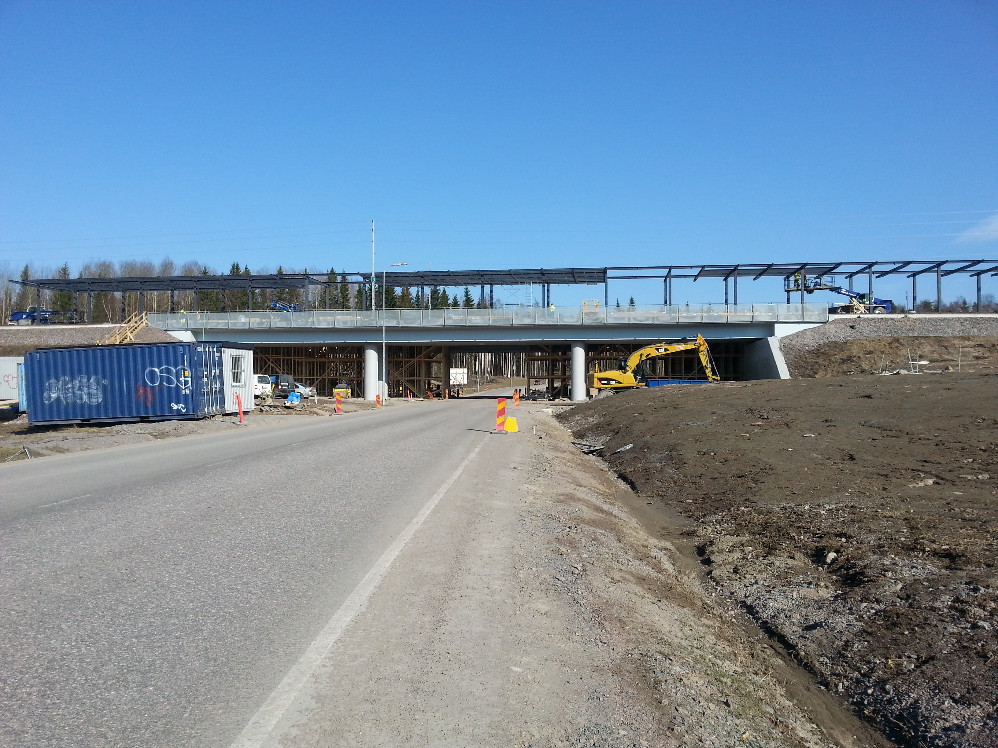 Vehkalan rautatieaseman rakennustyömaa Vantaalla